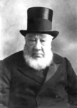 Kruger